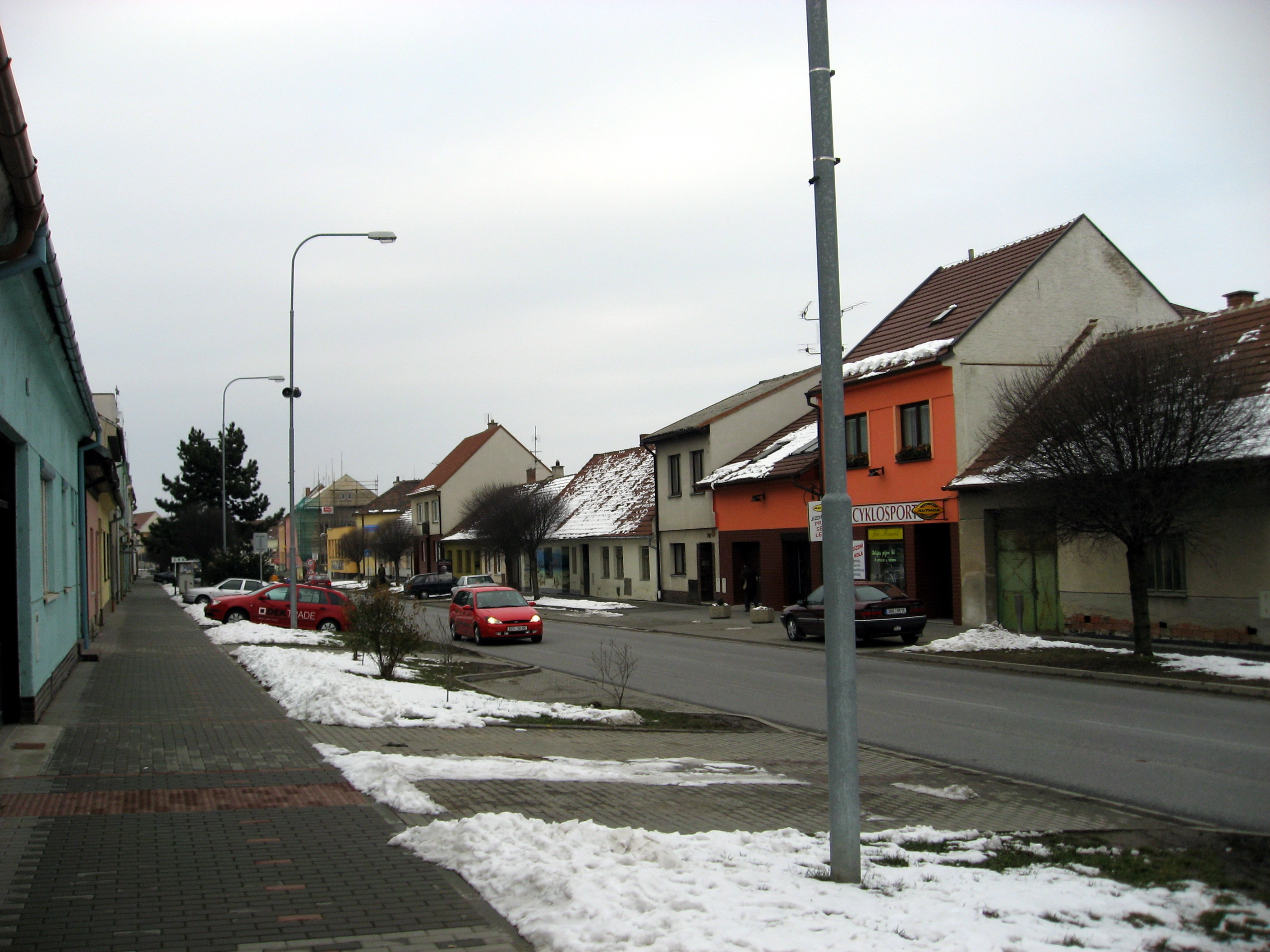 Rajhrad, Masarykova ulice